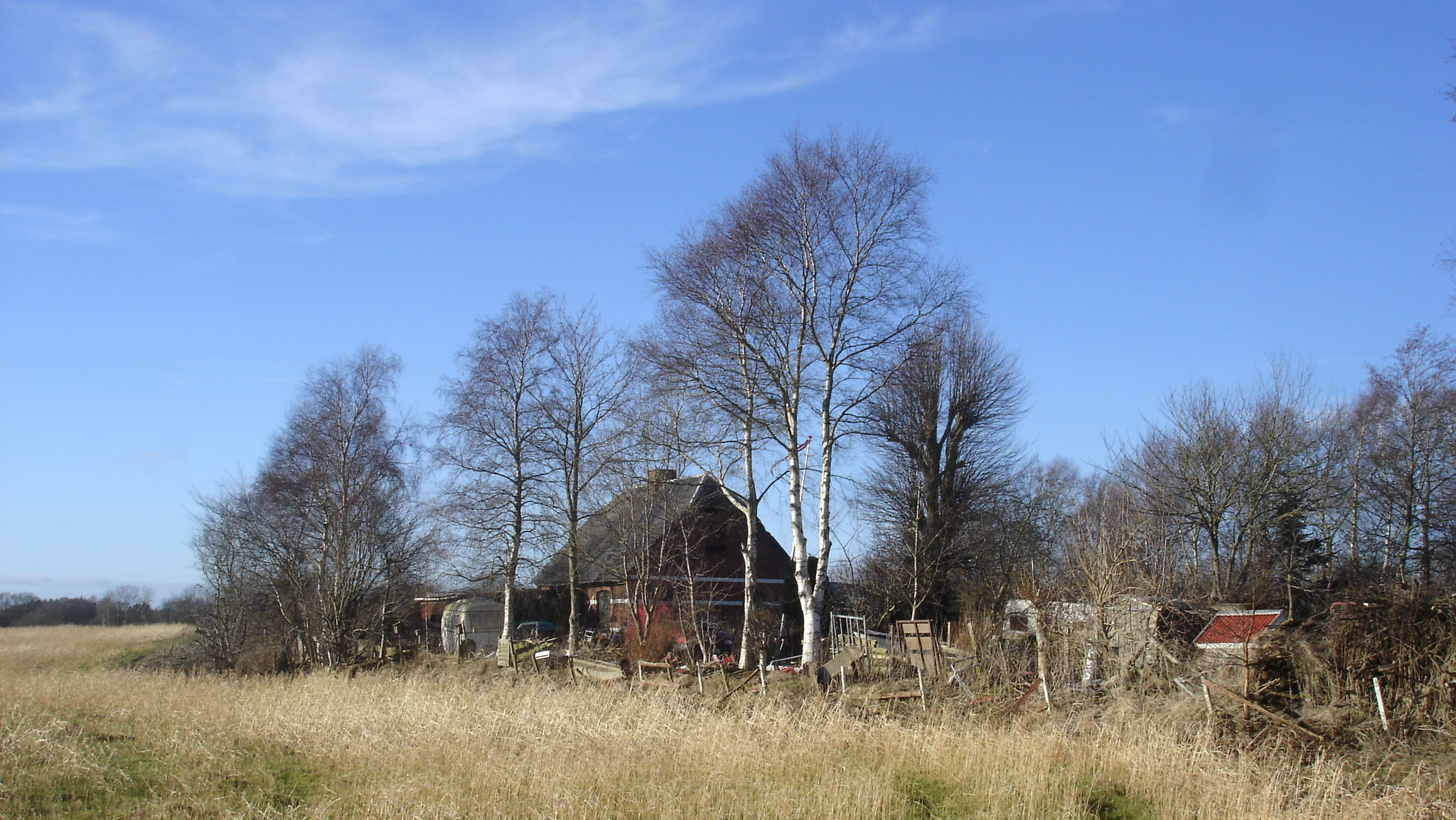 Bølling Station fra sydøst